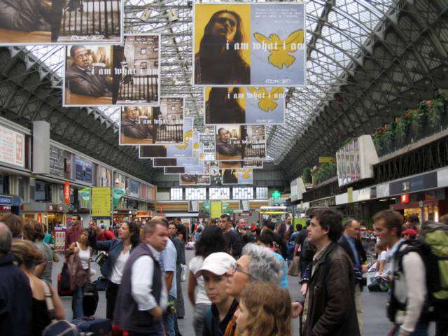 Bahnhofshalle Gare de l'Est